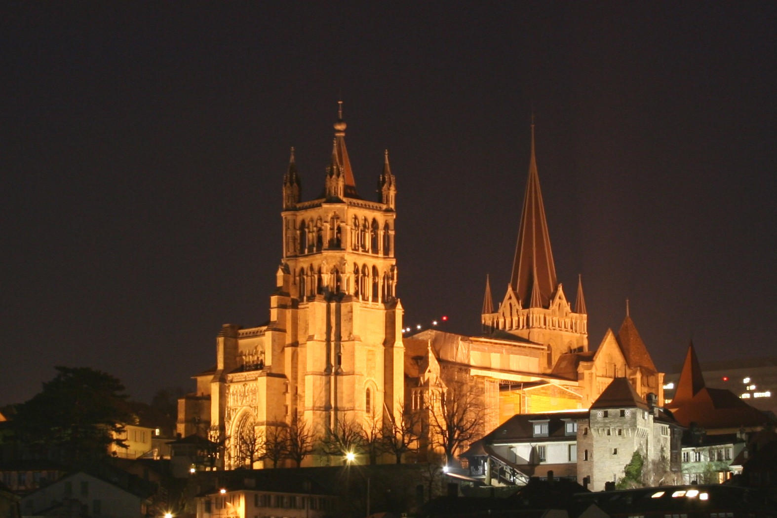 Cathédrale de Lausanne de nuit, février 2006